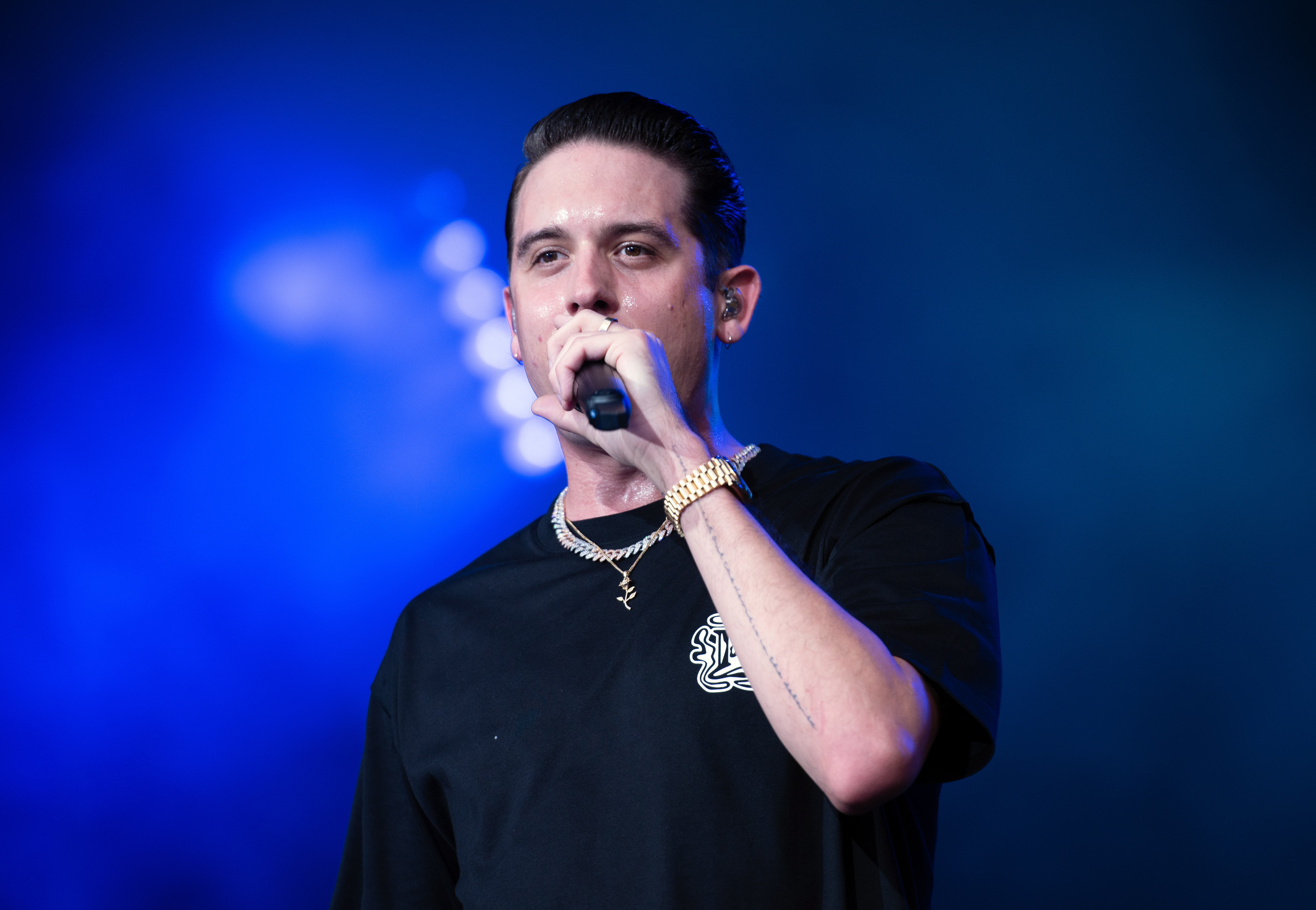 G-Eazy live auf dem Openair Frauenfeld 2019